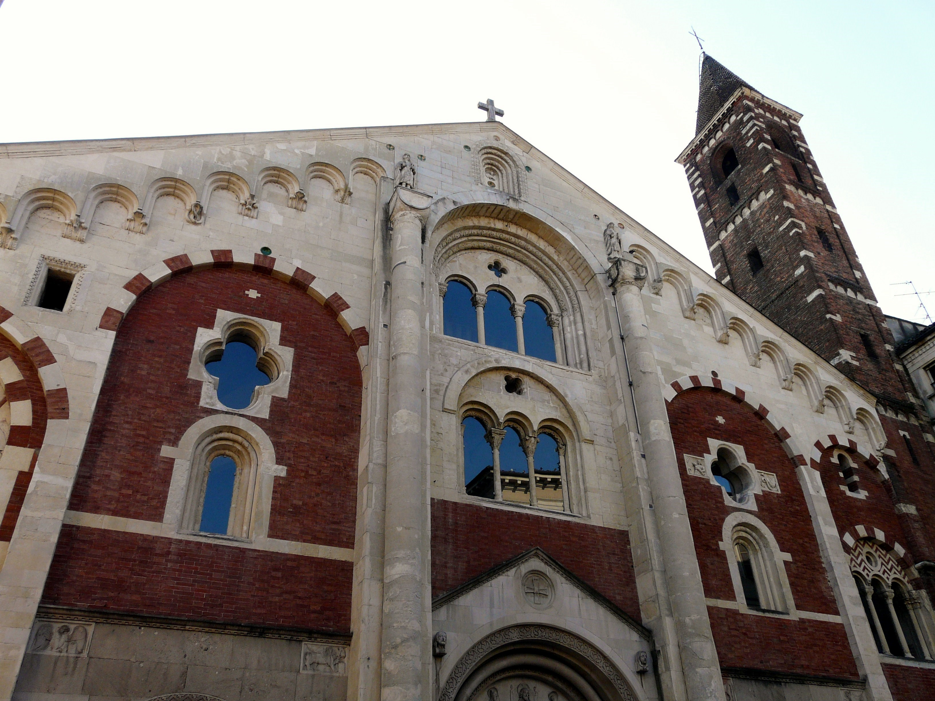 Facciata della cattedrale di Sant'Evasio, Casale Monferrato, Piemonte, Italia